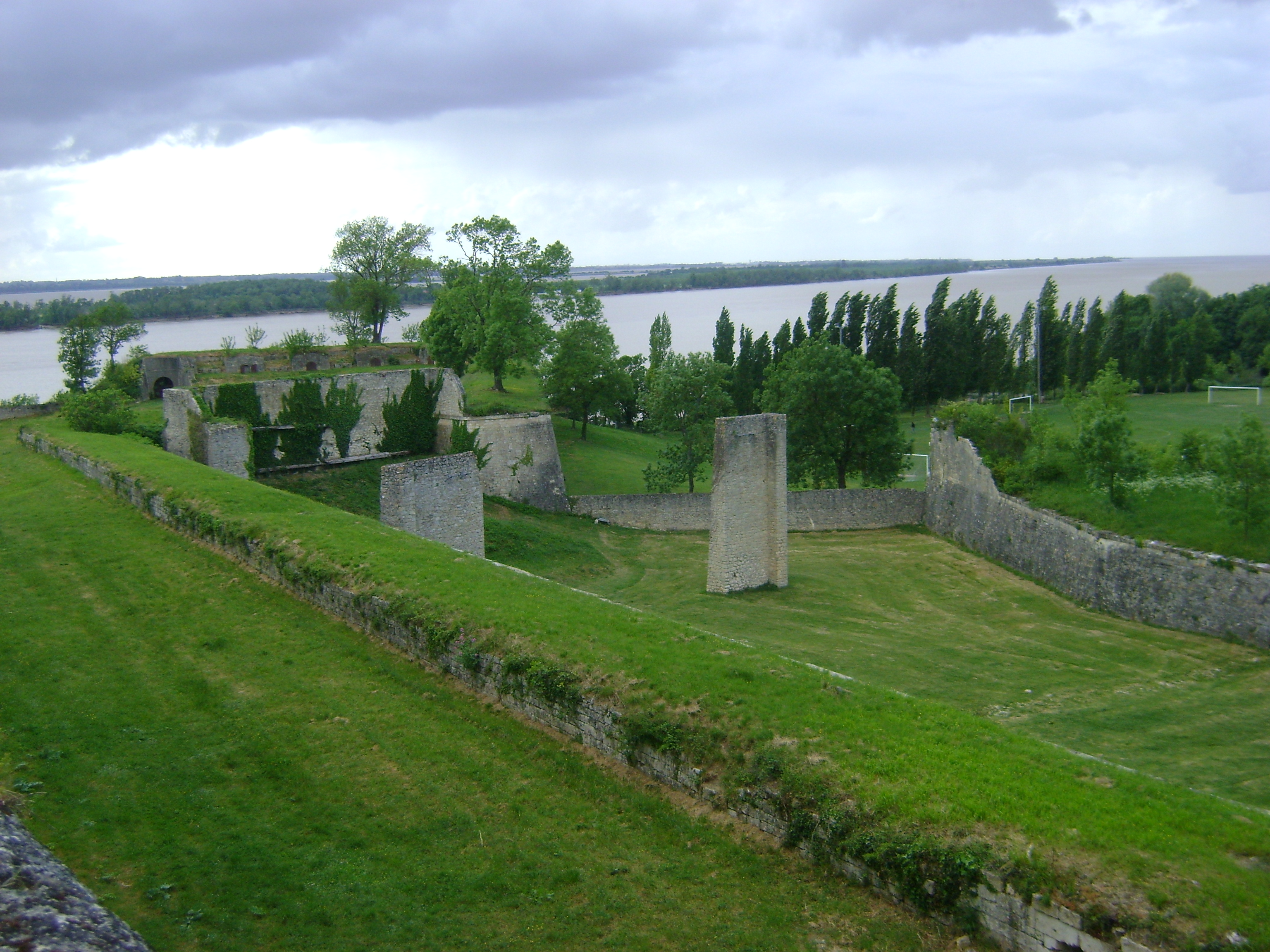 Citadelle de Blaye, Gironde. Vestiges au Nord de la Citadelle. .